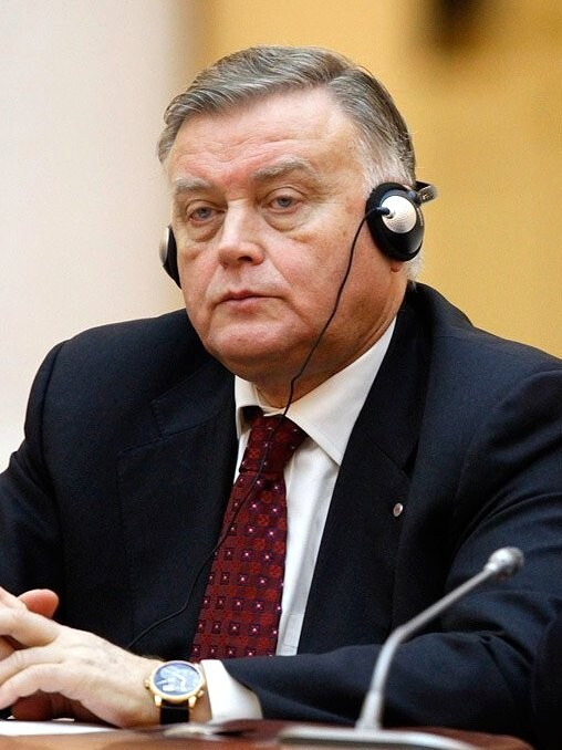 Президент компании «Российские железные дороги» Владимир Якунин